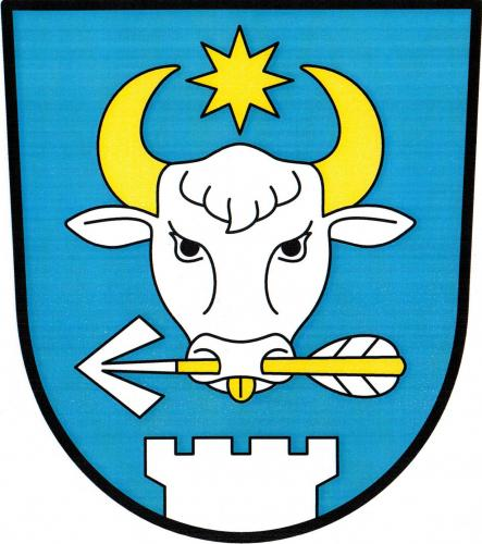 Znak obce Radovesnice I